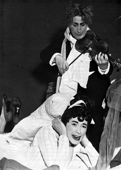 Sven-Erik_Wikström and Elisabeth Söderstrom in Orphée aux Enfers